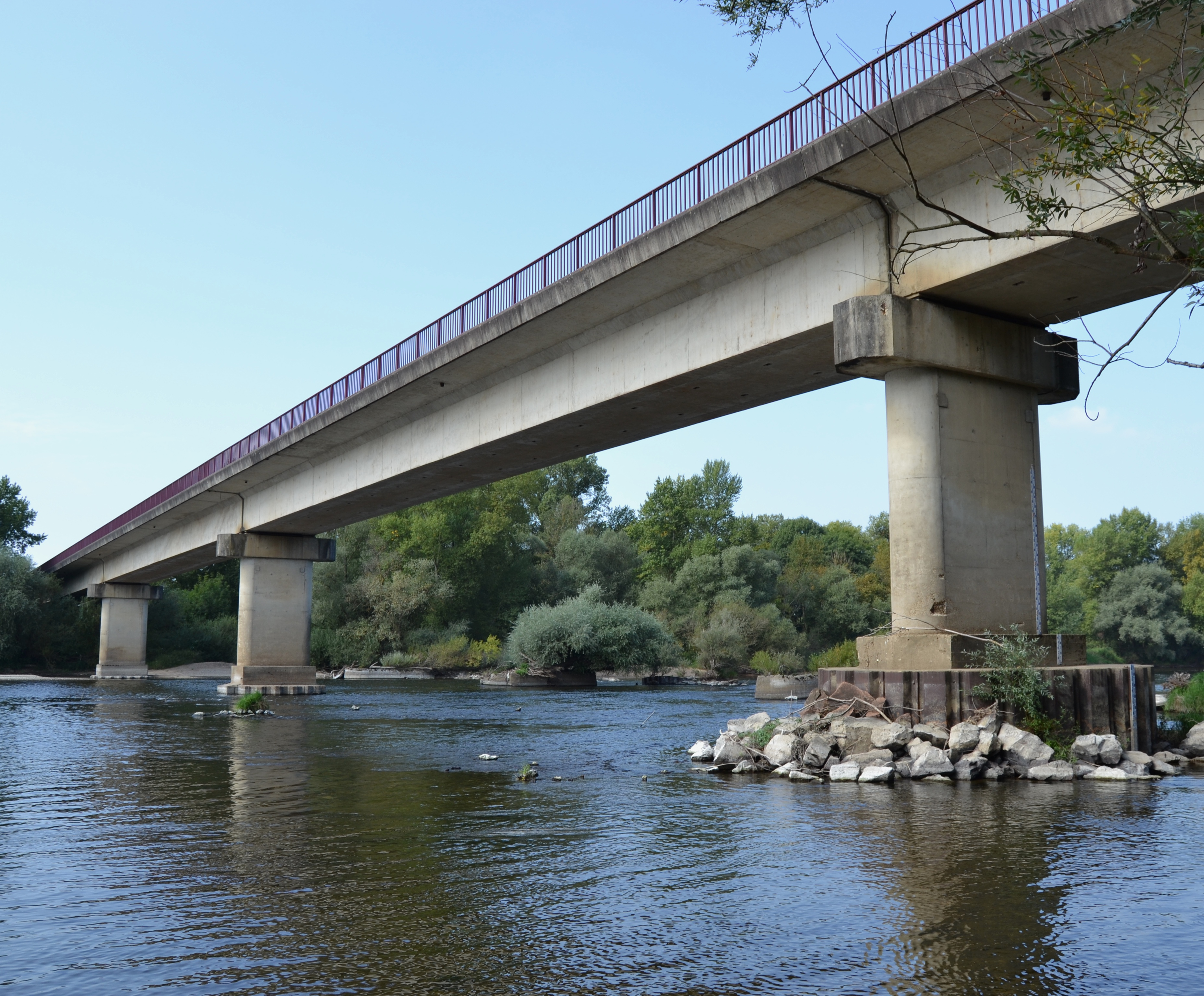 Pont d'Imphy